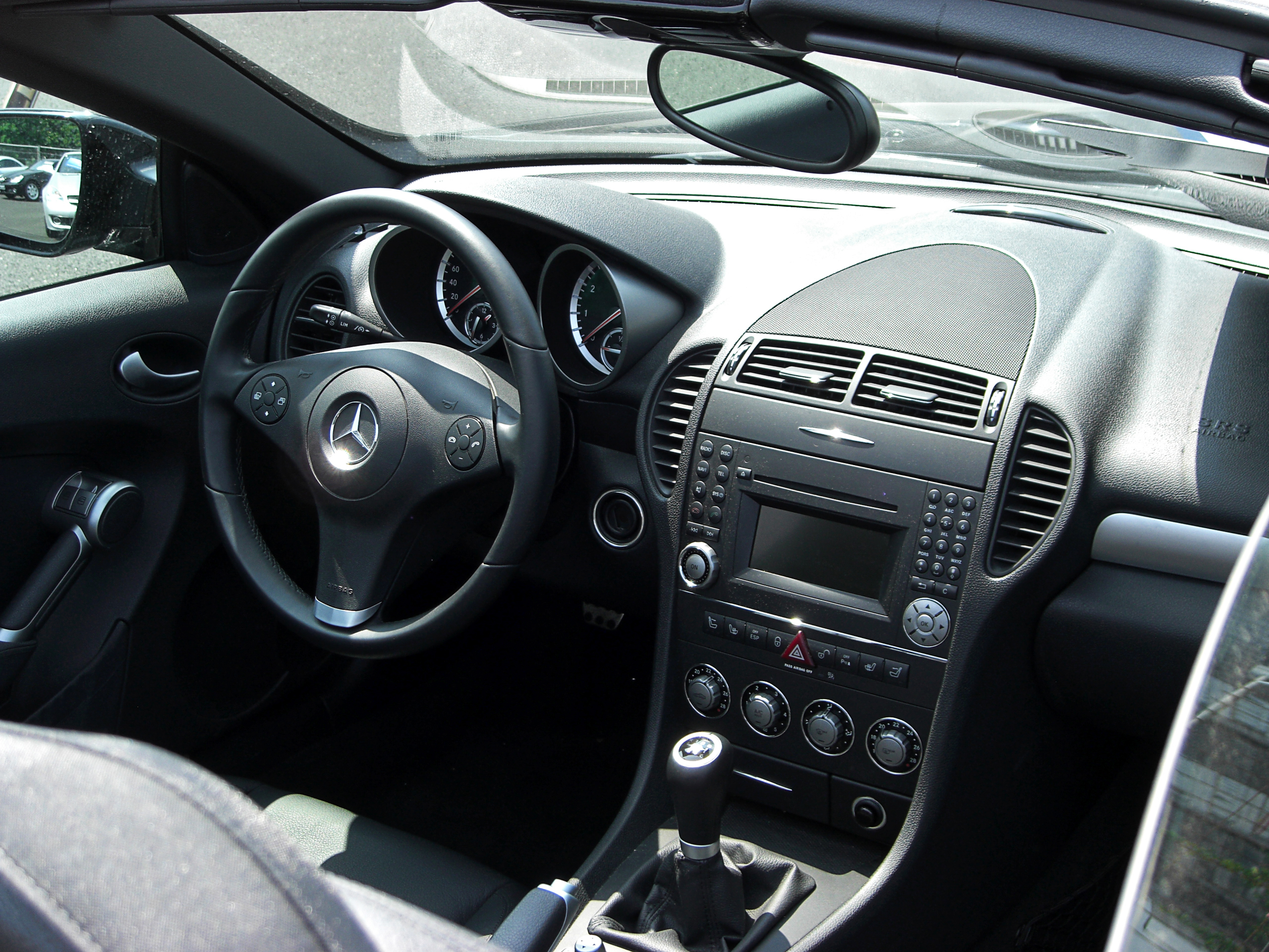 Mercedes-Benz SLK 200 Kompressor (R 171, Facelift)